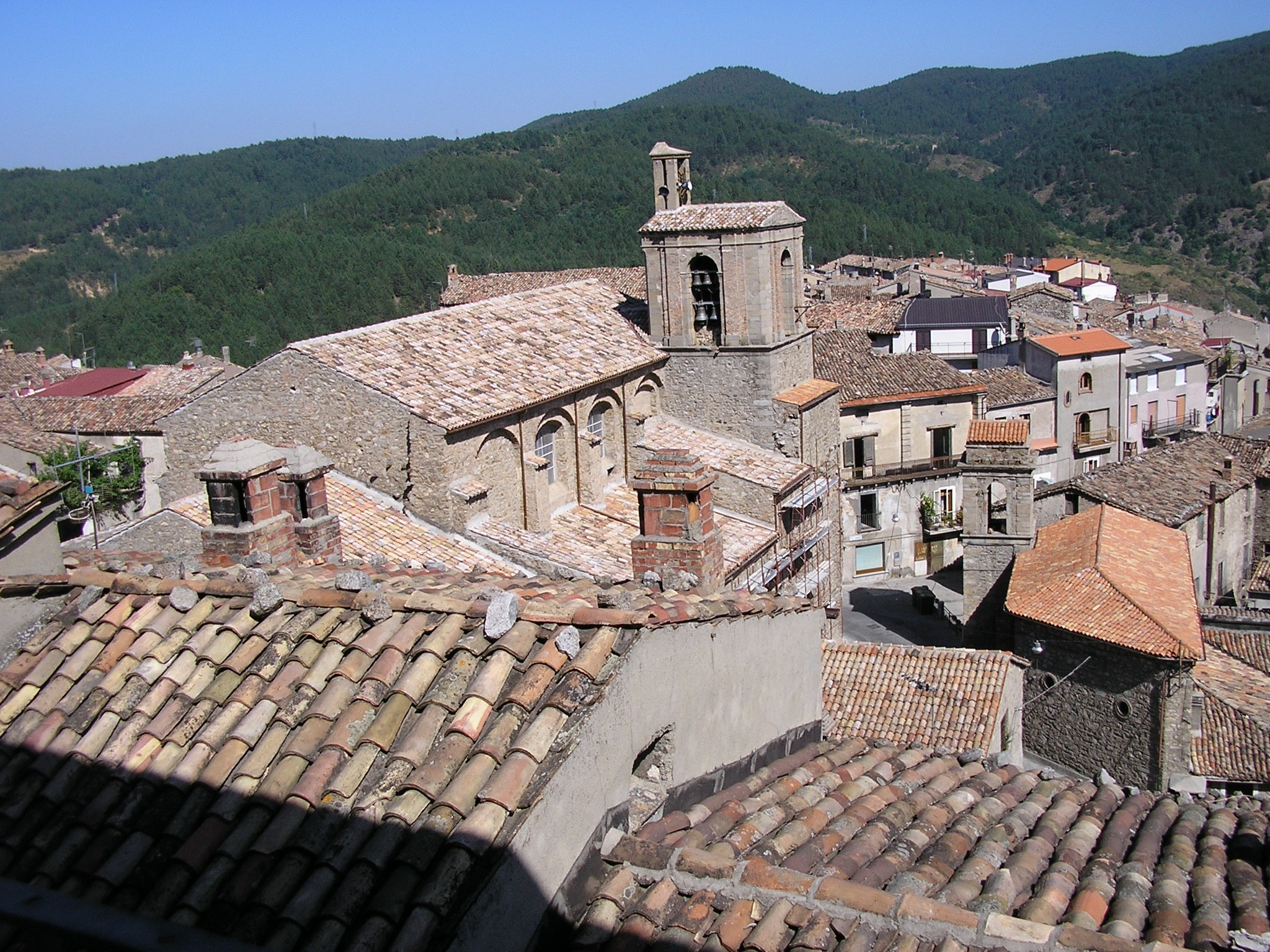 San Giovanni in Fiore vista del centro storico (Via Vallone). Autore Bernardo Barberio